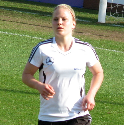 Leonie Maier